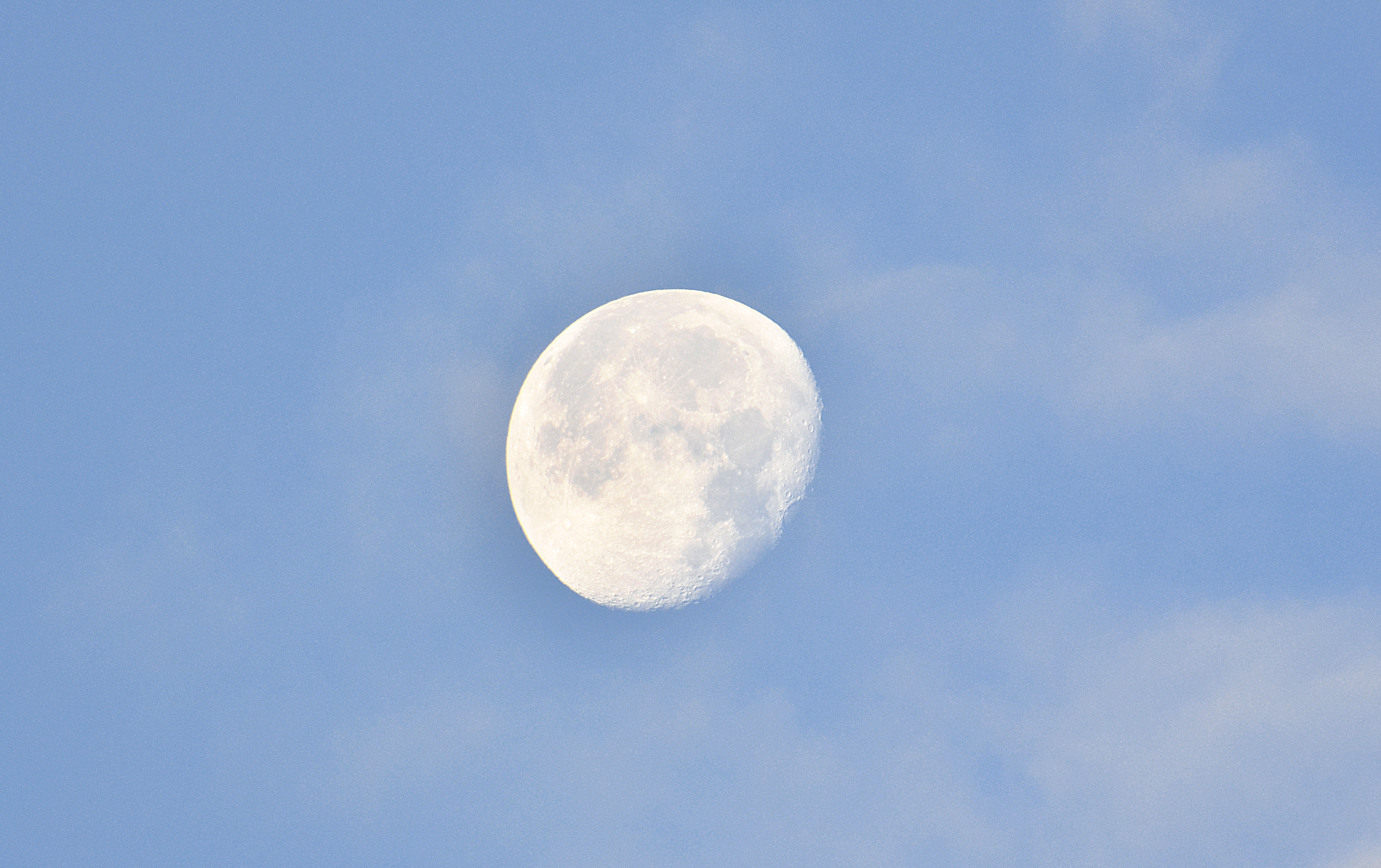 Можно увидеть здесь